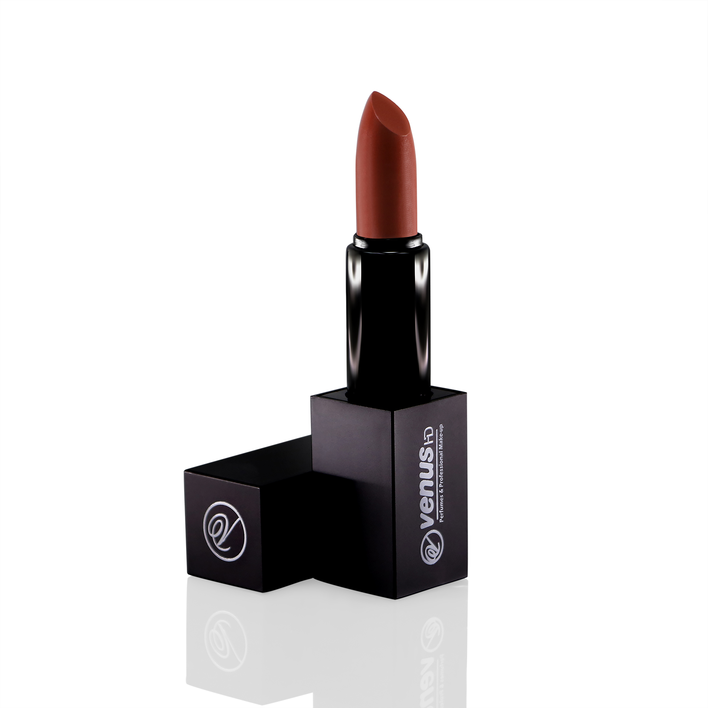 روووج